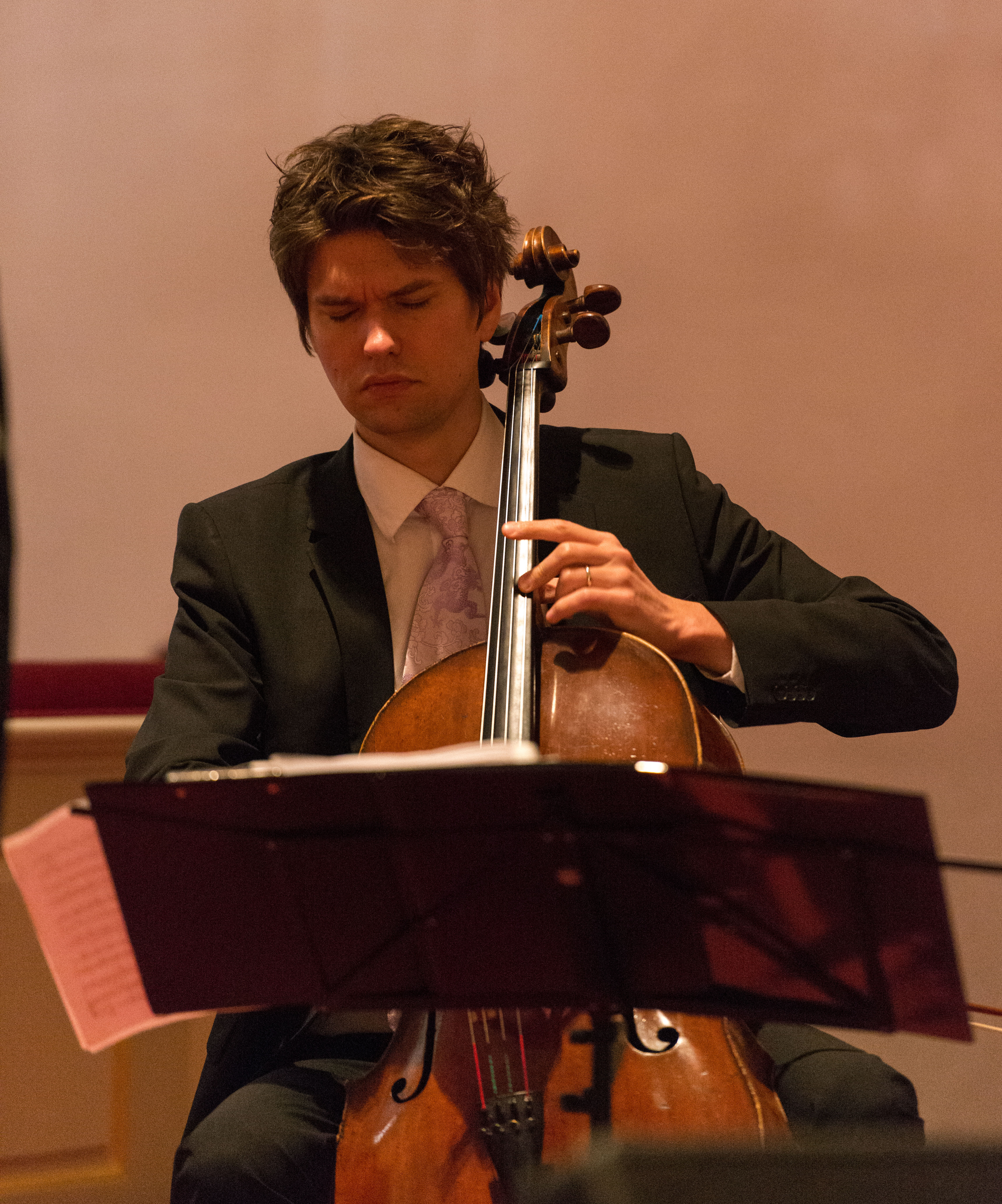 Jussi Makkonen suomalainen sellisti